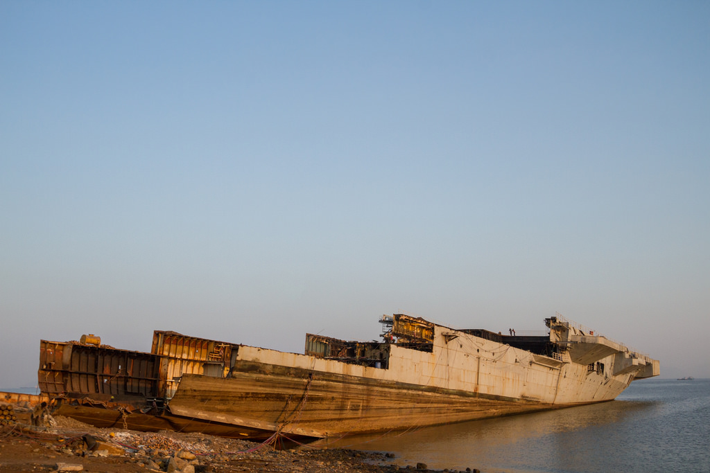 INS Vikrant (R11) being scapped at Mumbai